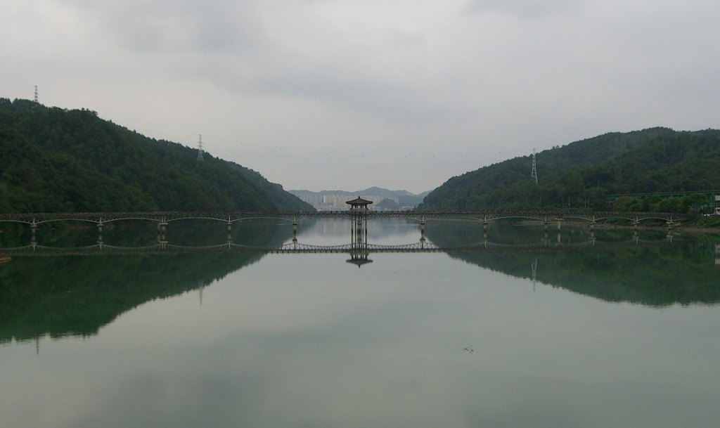 Die "Mondlichtbrücke" über den Nakdong-Fluss bei Andong, im Hintergrund die Stadt